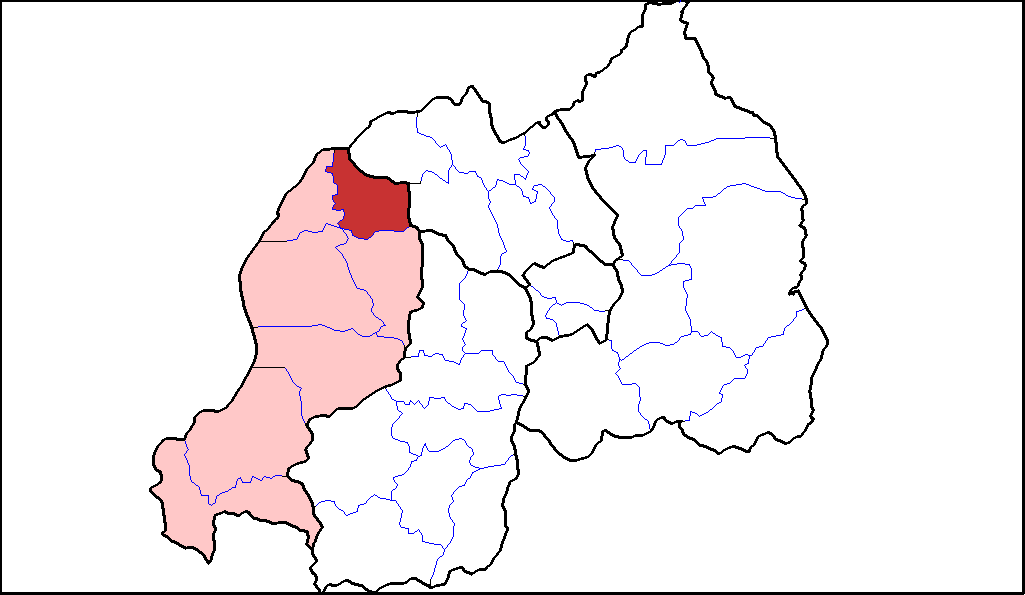 Distretto di Nyabihu.